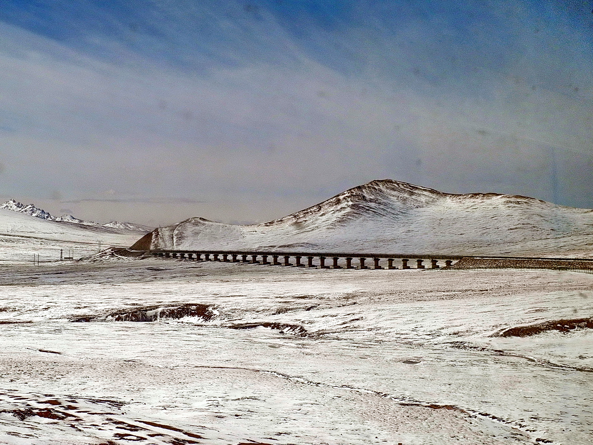 Lhassa-Xining railway after golmud